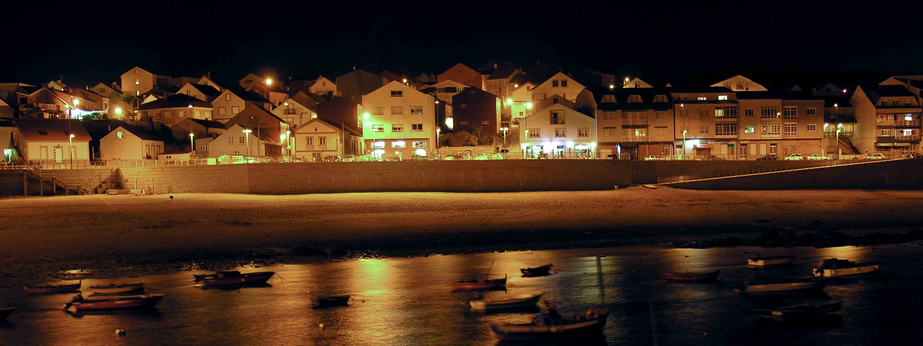 Castiñeiras - Ribeira - Galicia - Spain